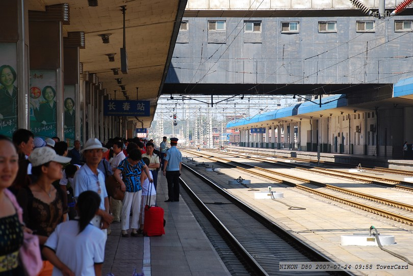 长春站2站台，沈阳方向